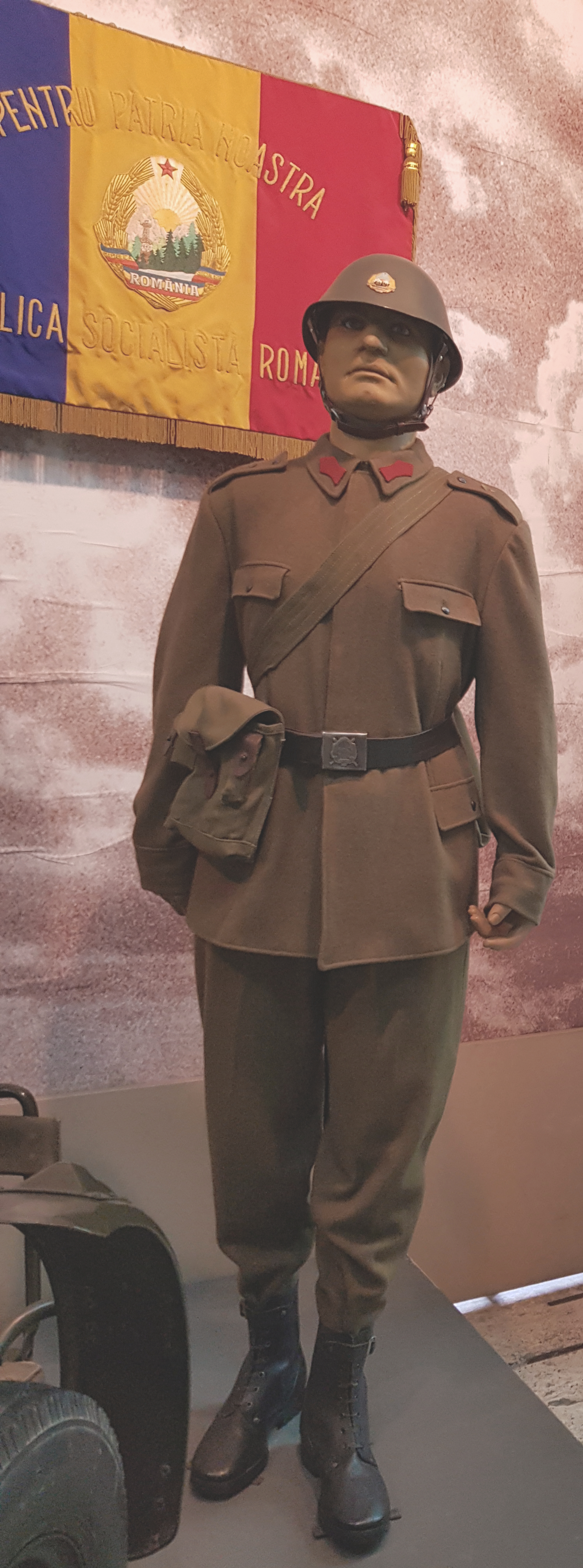 Alltagsuniform eines Infanteristen der rumänischen Armee, Ausführung 1975.